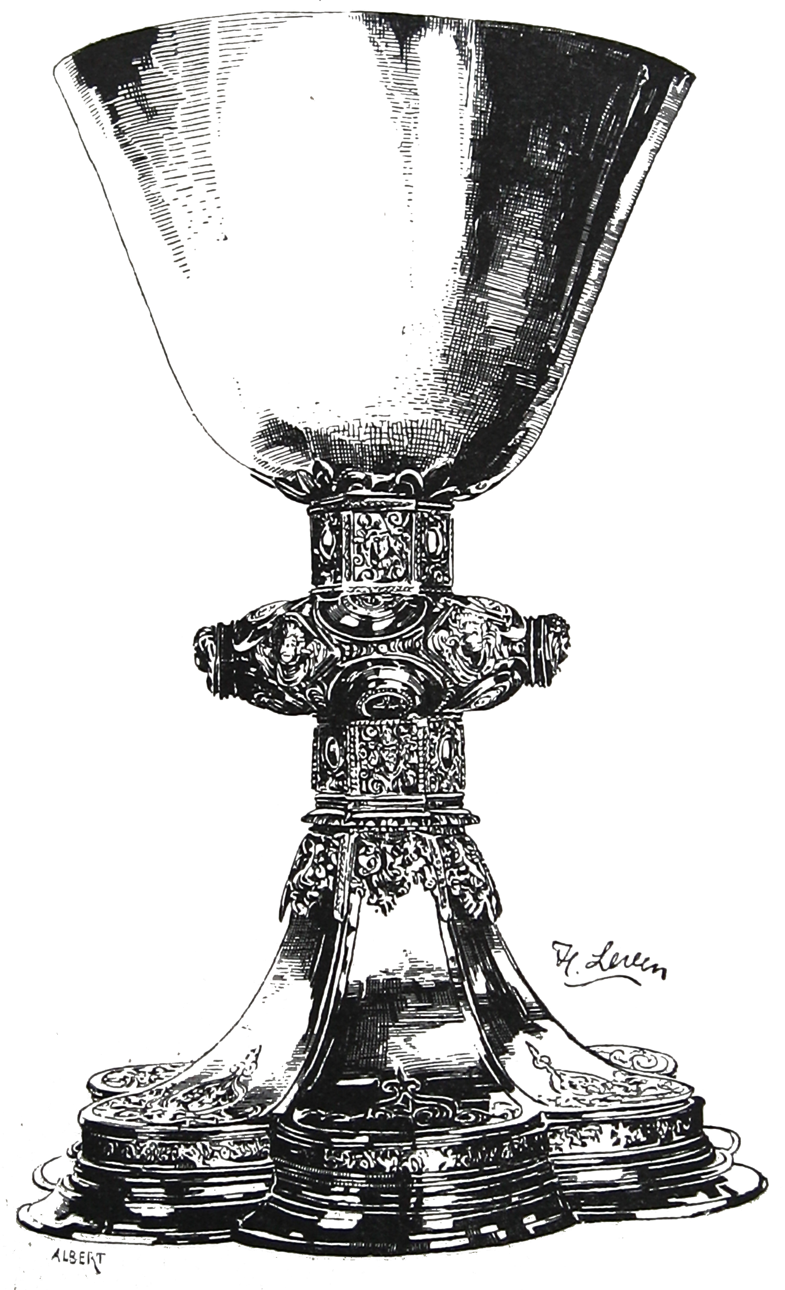 Dortmund, Marienkirche, Kelch